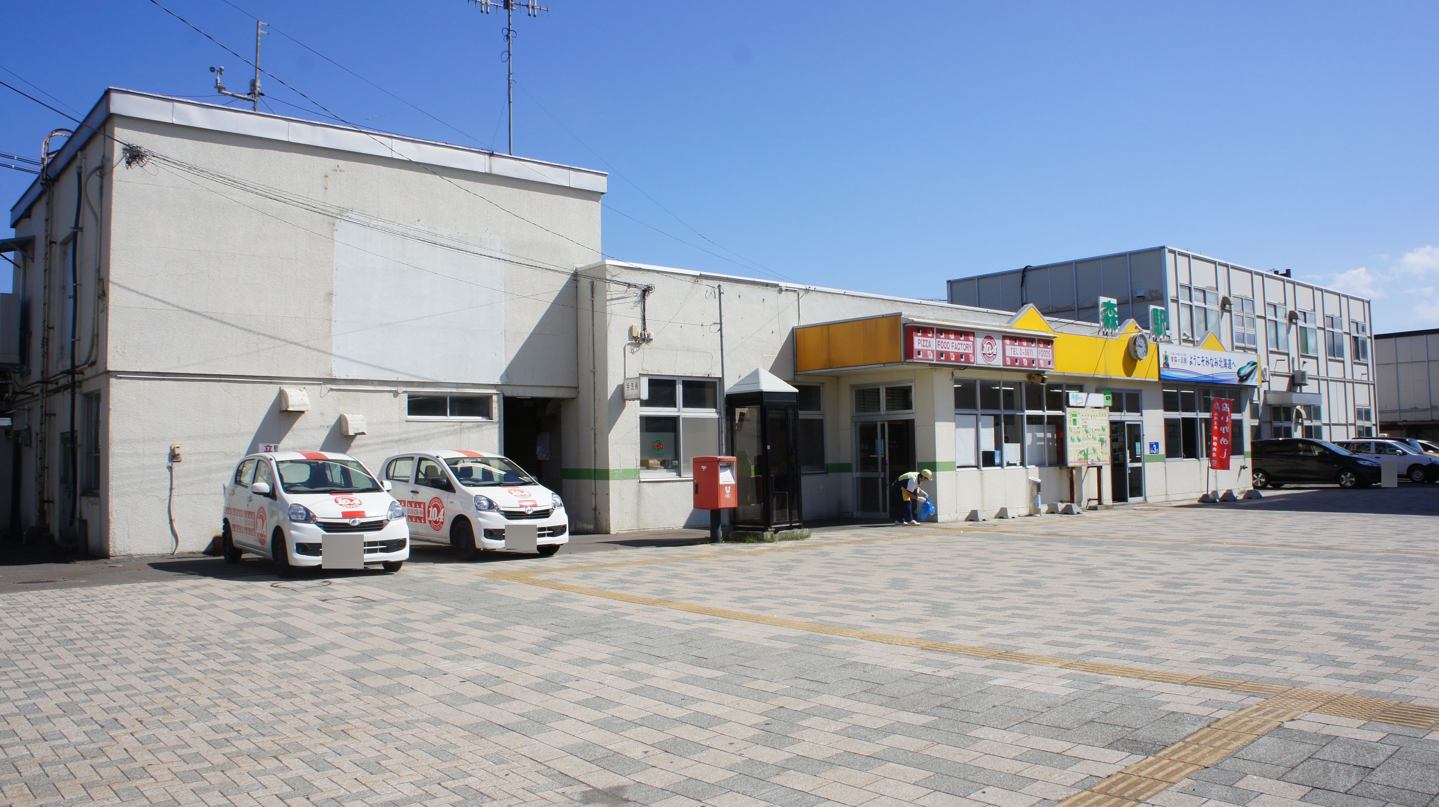 JR函館本線・森駅の駅舎 Sony NEX-3